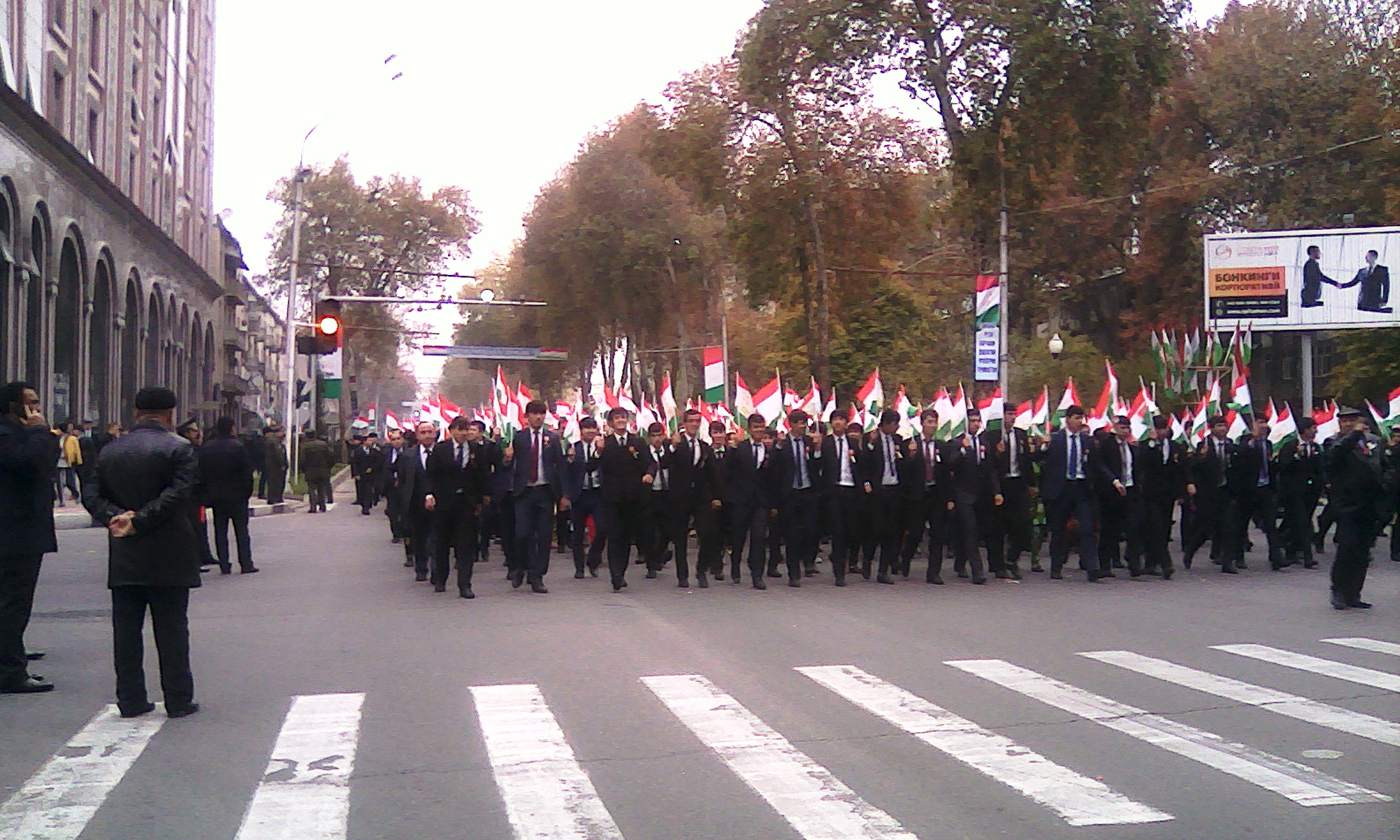 День национального флага на улицах г. ДушанбеТоҷикӣ: Парчамҳои Тоҷикистон дар хиёбони Рӯдакӣ. Рӯзи парчами миллии Ҷумҳурии Тоҷикистон, 24 ноябр, ш. Душанбе